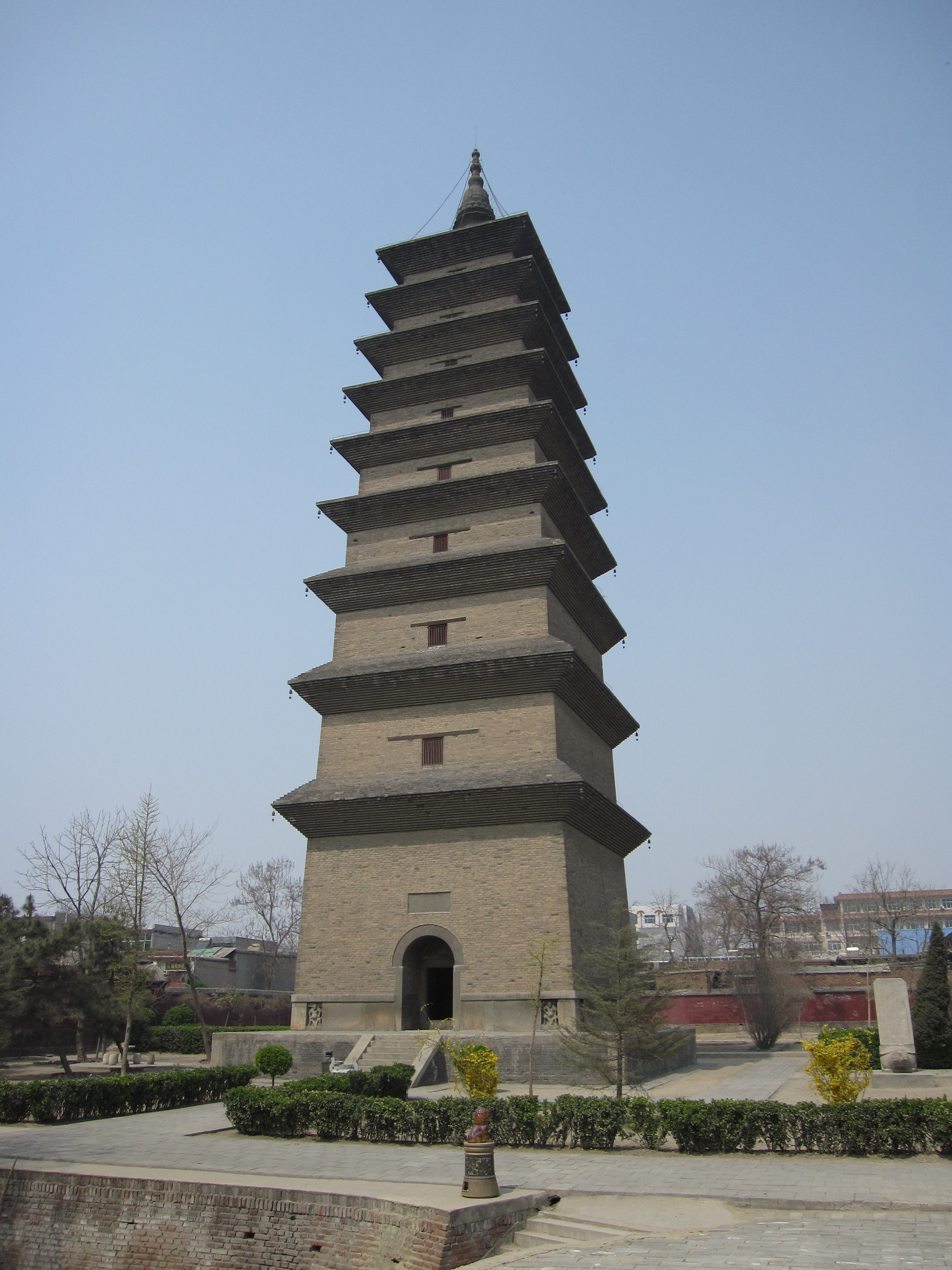 Xumi Pagoda at the Kaiyuan Monastery